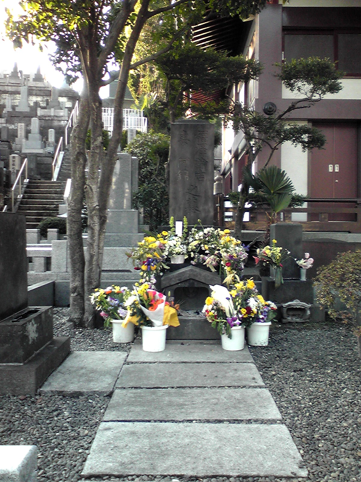 福沢諭吉の墓（雪池忌にて）